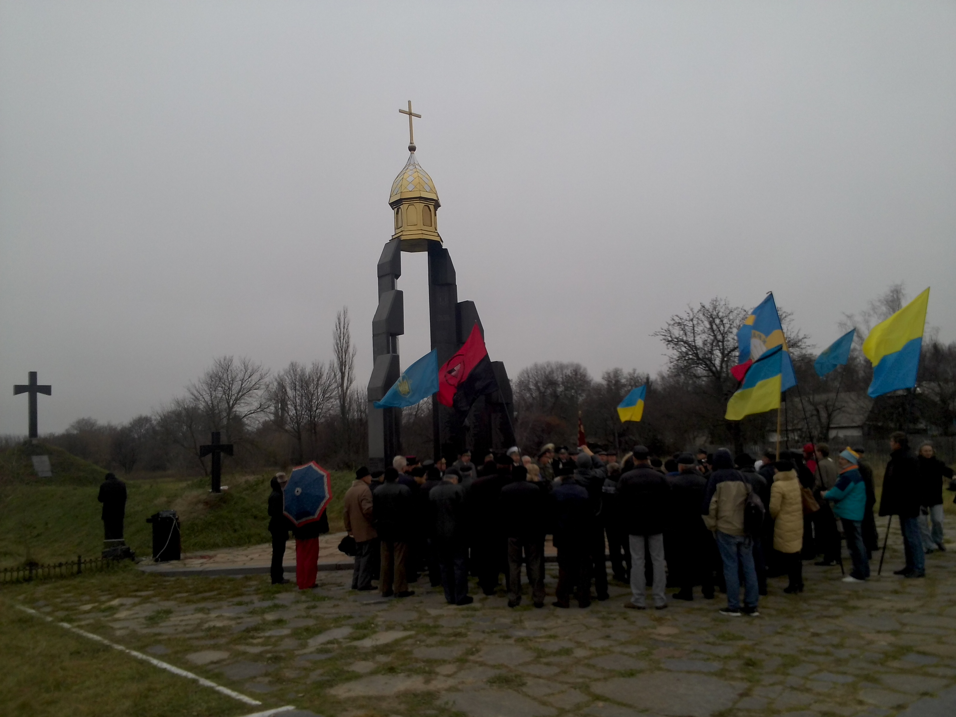 с. Базар. Братська могила воїнів ІІ Зимового походу армії УНР